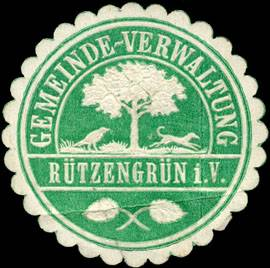 Sealing stamp Title: Gemeinde - Verwaltung Rützengrün Description: grün, weiß, geprägt Place: Rützengrün size: 3 cm